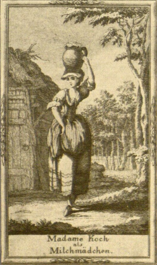 Schauspielerin und Sängerin Franziska Romana Koch als Milchmädchen